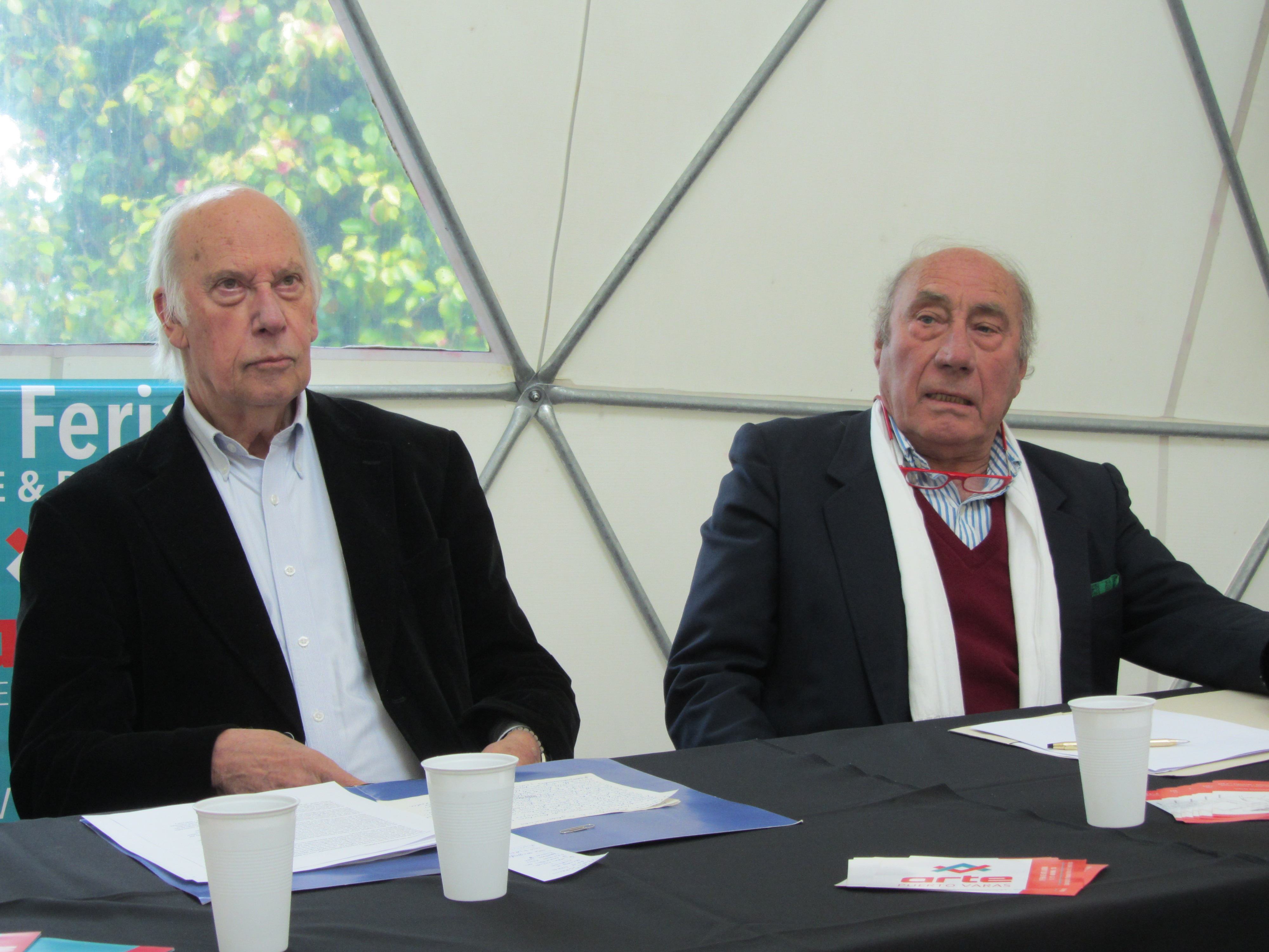 El crítico de arte chileno Milan Ivelic y el escultor chileno Gaspar Galaz en el Kunstgarten durante la 3ª Feria Arte & Diseño de Puerto Varas, noviembre de 2015